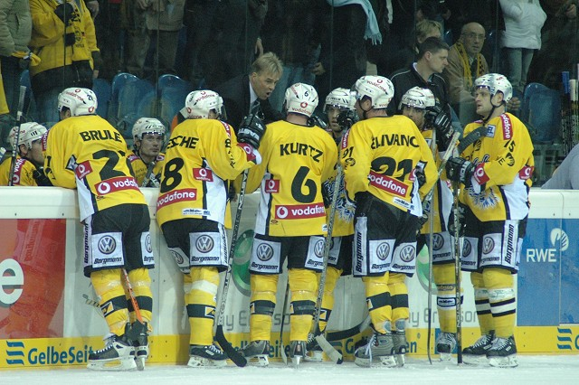 Krefeld Pinguine bei einer Auszeit mit Trainer Bob Leslie